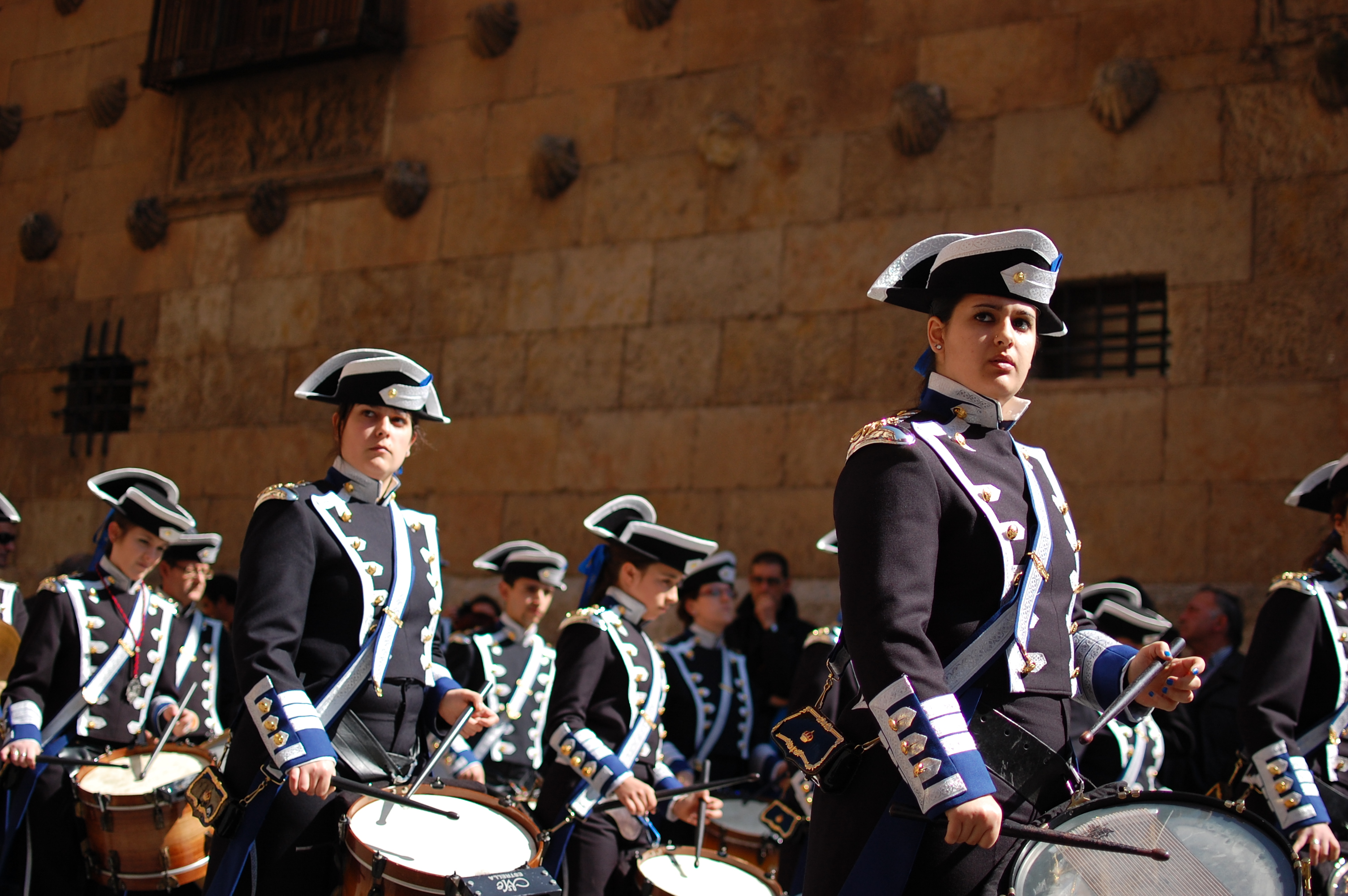 Agrupacion Musical Maria Stma. de la Estrella pasando por delante de la Casa de las Conchas en la procesión del Resucitado. Salamanca, 2012.